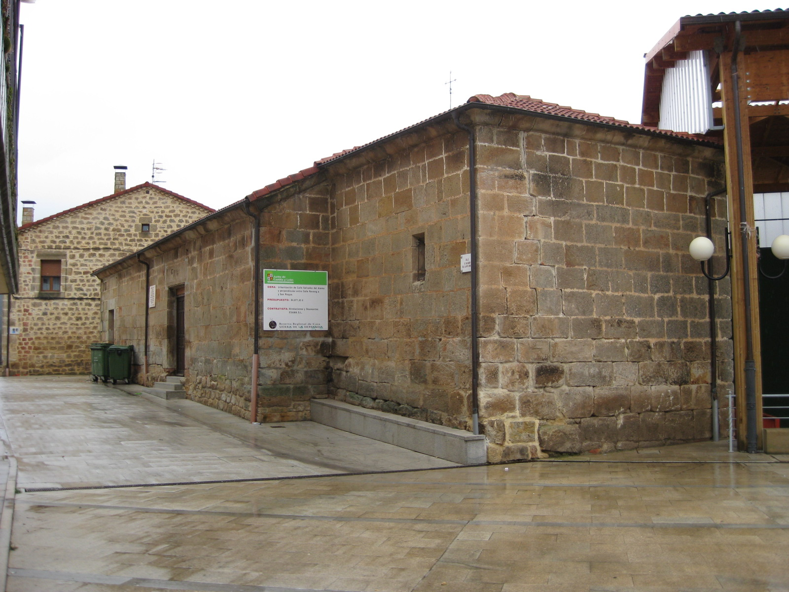 Edificio de la antigua ermita de la Veracruz, en Canicosa de la Sierra (Burgos, España).